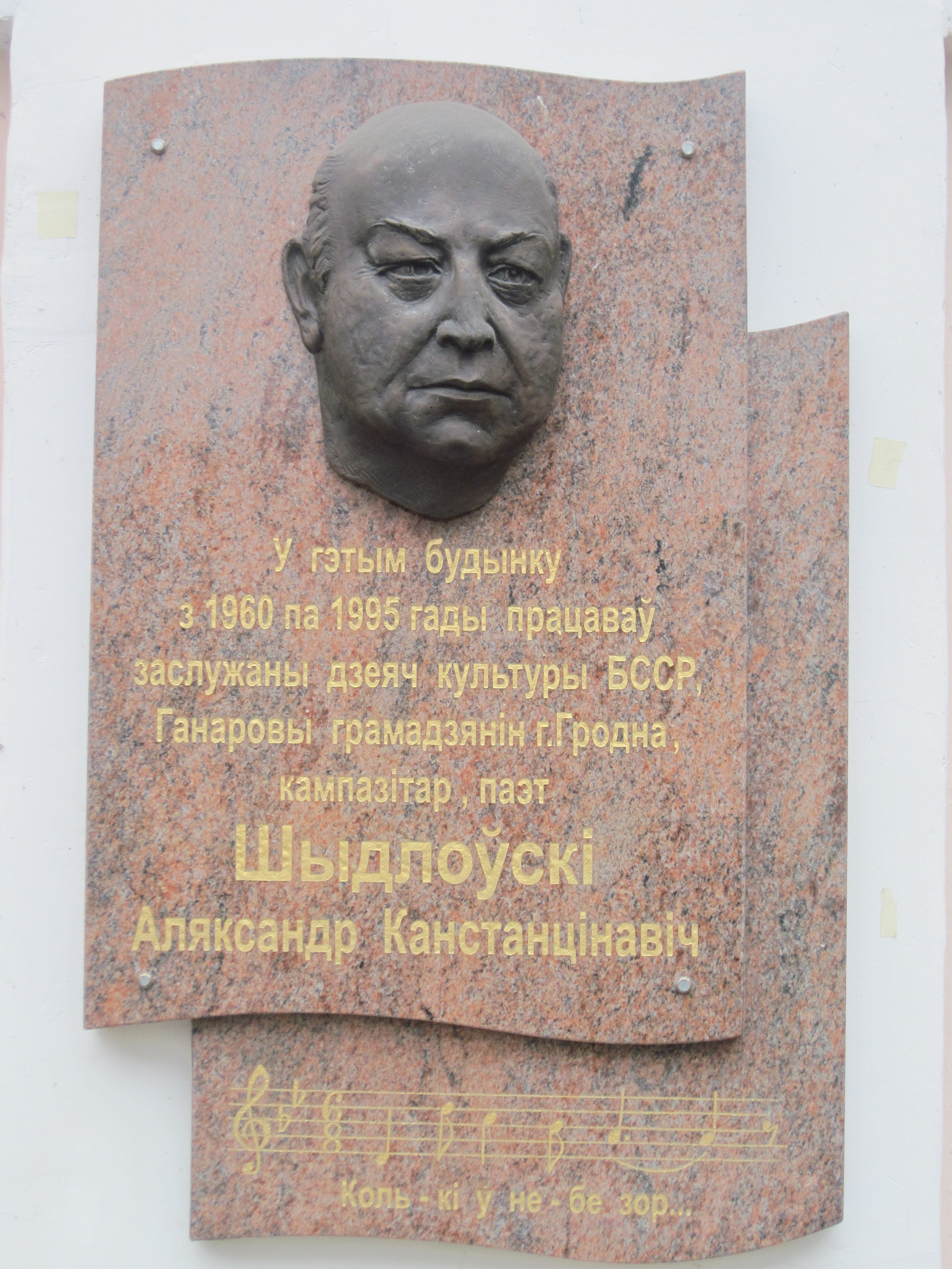 Беларуская (тарашкевіца): Мемарыяльная дошка кампазітару Шыдлоўскаму, Гродна, Савецкая, 8